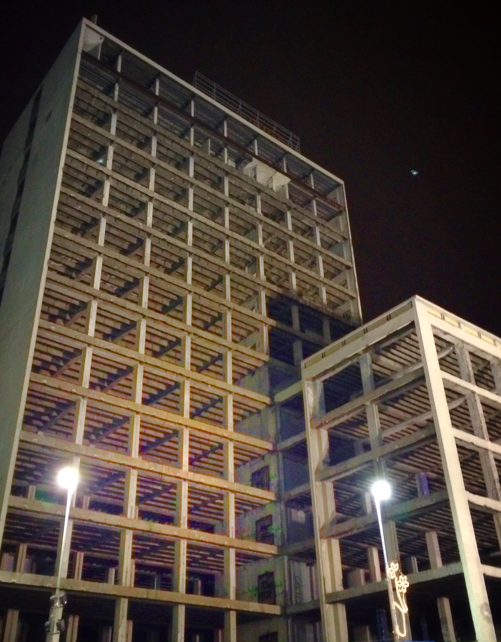 Beograd/beobanka